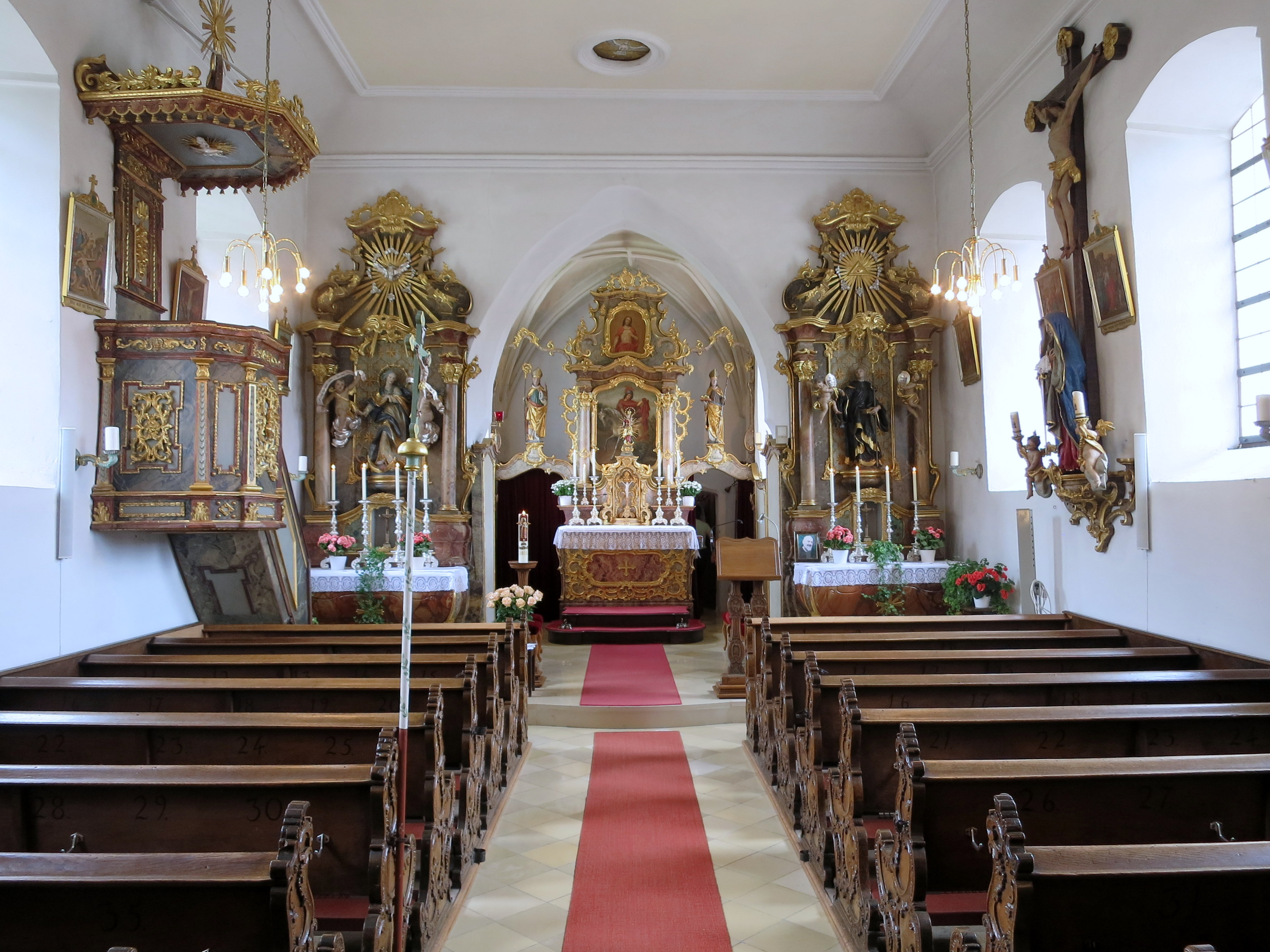 Verputzter Satteldachbau mit Bogenfries in Walkersbach